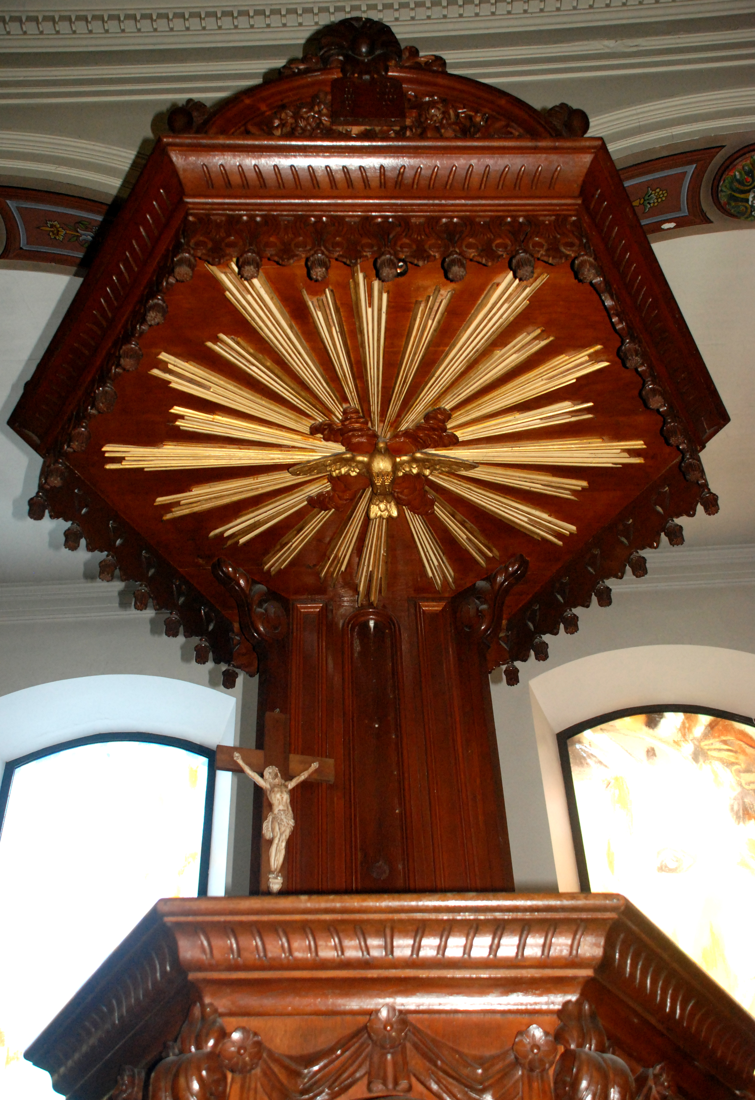 Belgique - Bousval - Église Saint-Barthélemy de Bousval